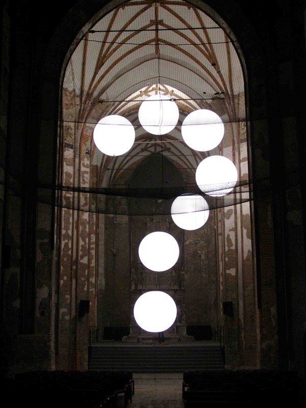 Light installation of Robert Stadler at St. John Church in Gdansk - Poland in march 2009